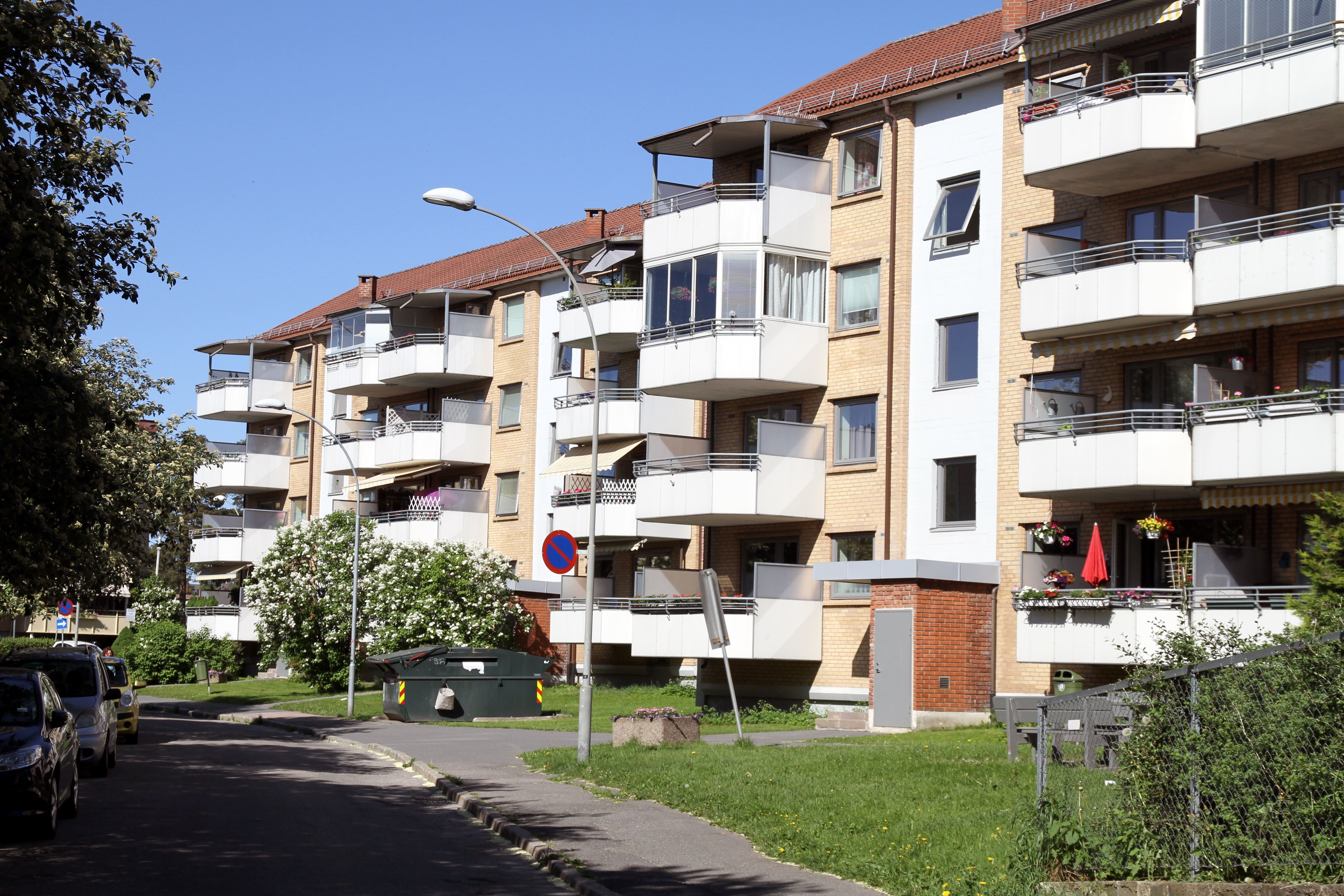 Formerveien på Oppsal.